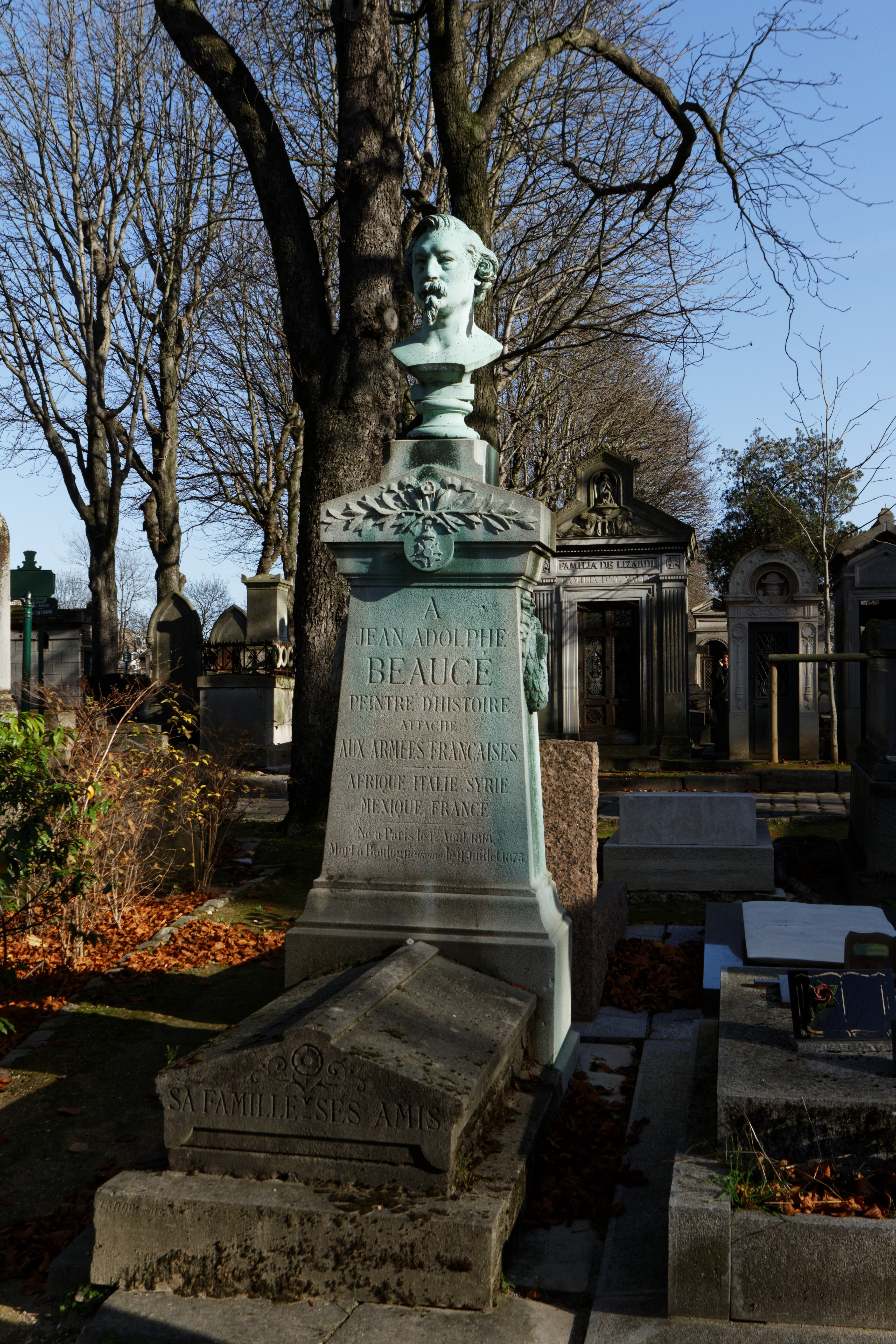 Sépulture de Jean-Adolphe Beaucé (1818-1875), peintre qui illustra de nombreuses scènes de batailles et des œuvres d'Alexandre Dumas. Stèle ornée d'un buste en bronze signé A son ami J.-A. Beaucé, 1855. Th. Devaulx.